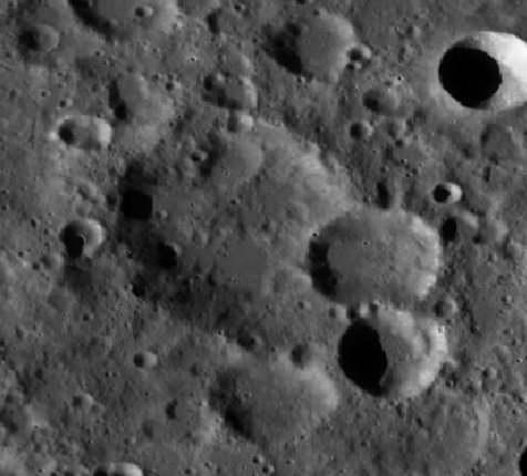 Cráter Champollion (LRO)